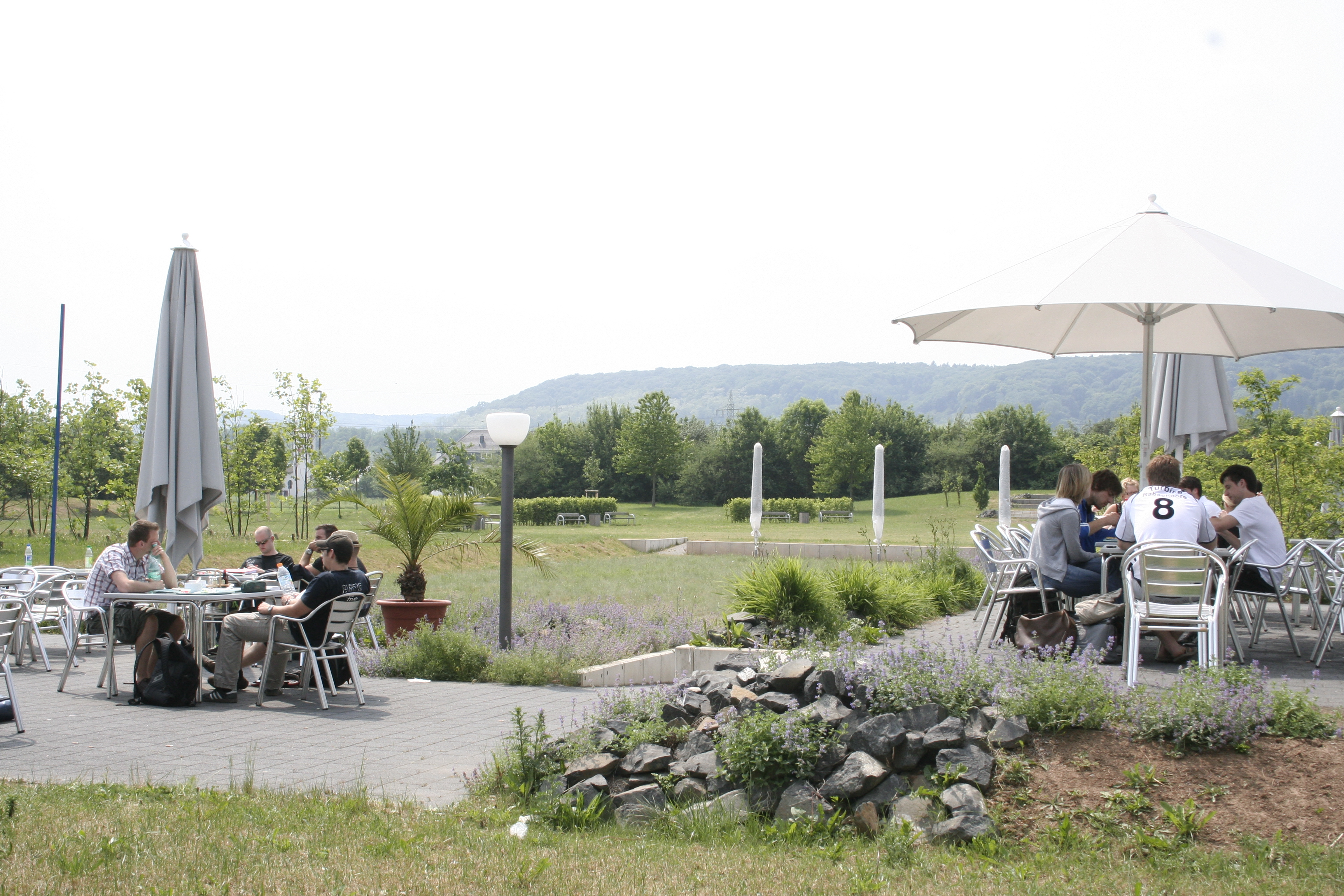 Der Mensa Außenbereich am RheinAhrCampus